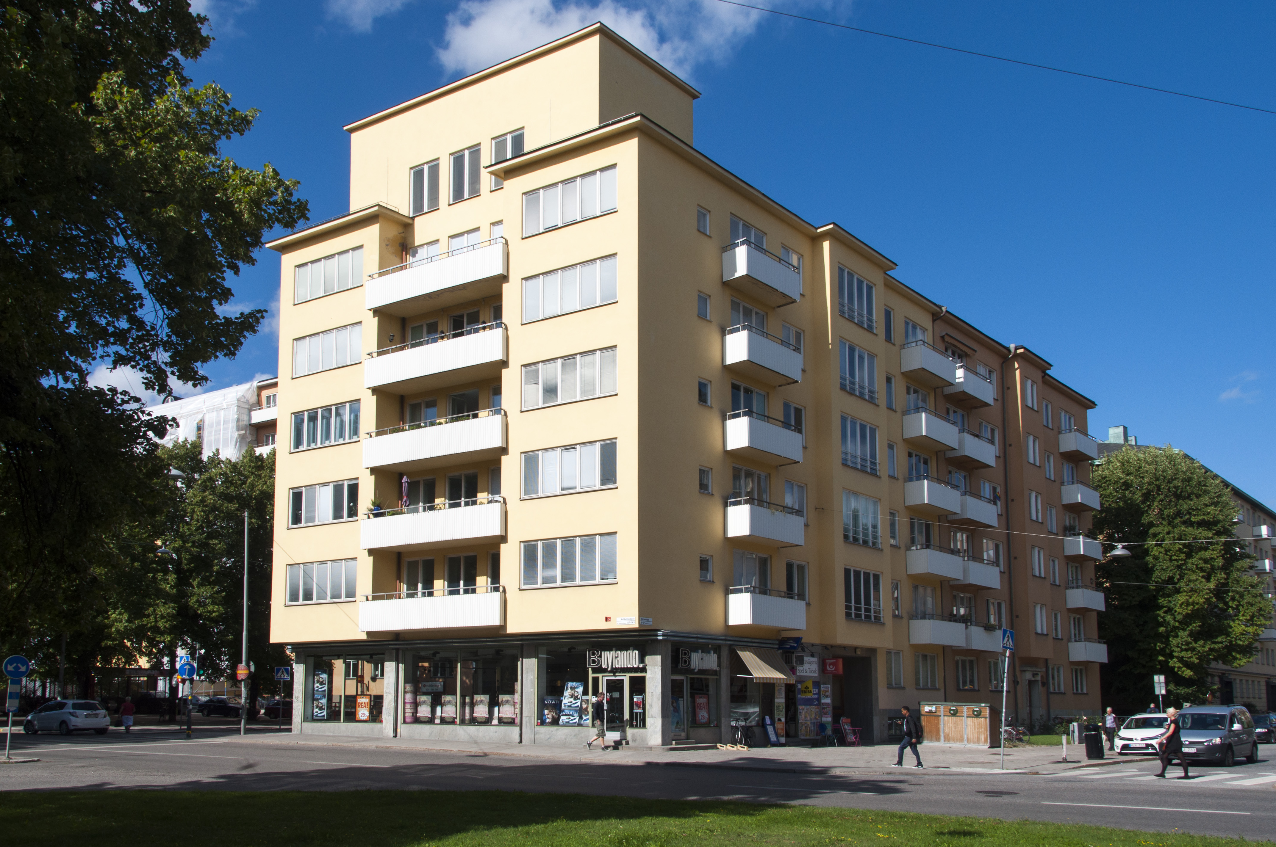 Demonstrationen 1, Valhallavägen 163, Värtavägen 11, Stockholm, Nybyggnadsår 1932, Måns A. Eriksson (Byggherre) Måns A. Eriksson (Byggmästare) Wolter Gahn (Arkitekt)